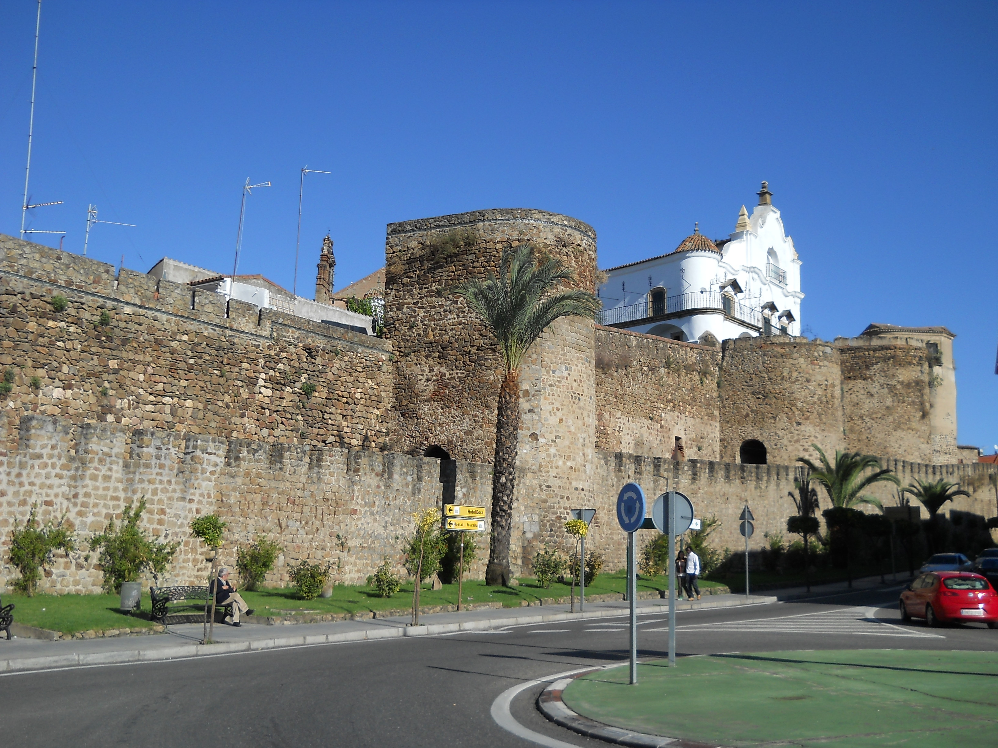 Parte sur de la muralla de Plasencia, Cáceres, España.